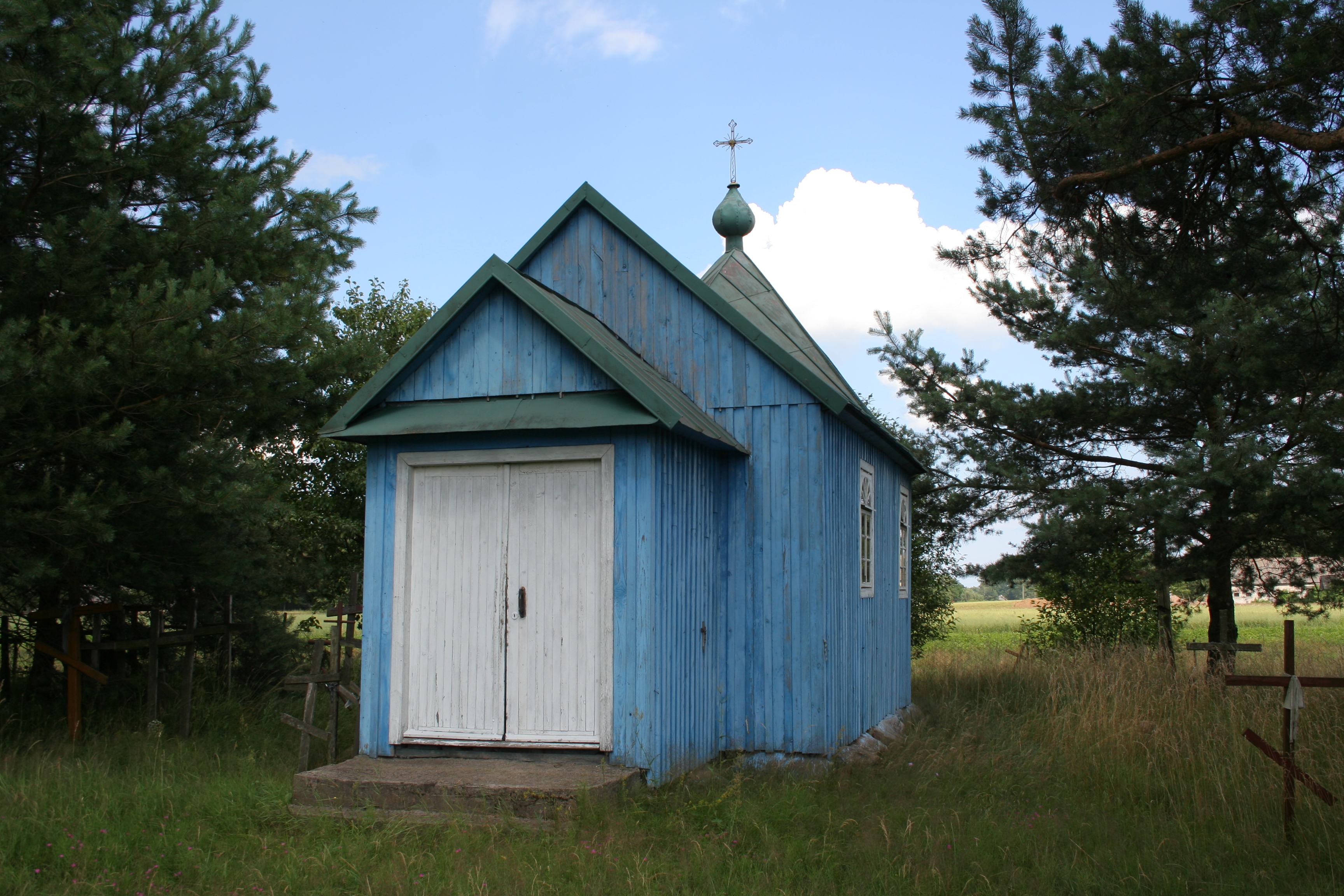 Cerkiew św. Braci Machabeuszy w Ladach.